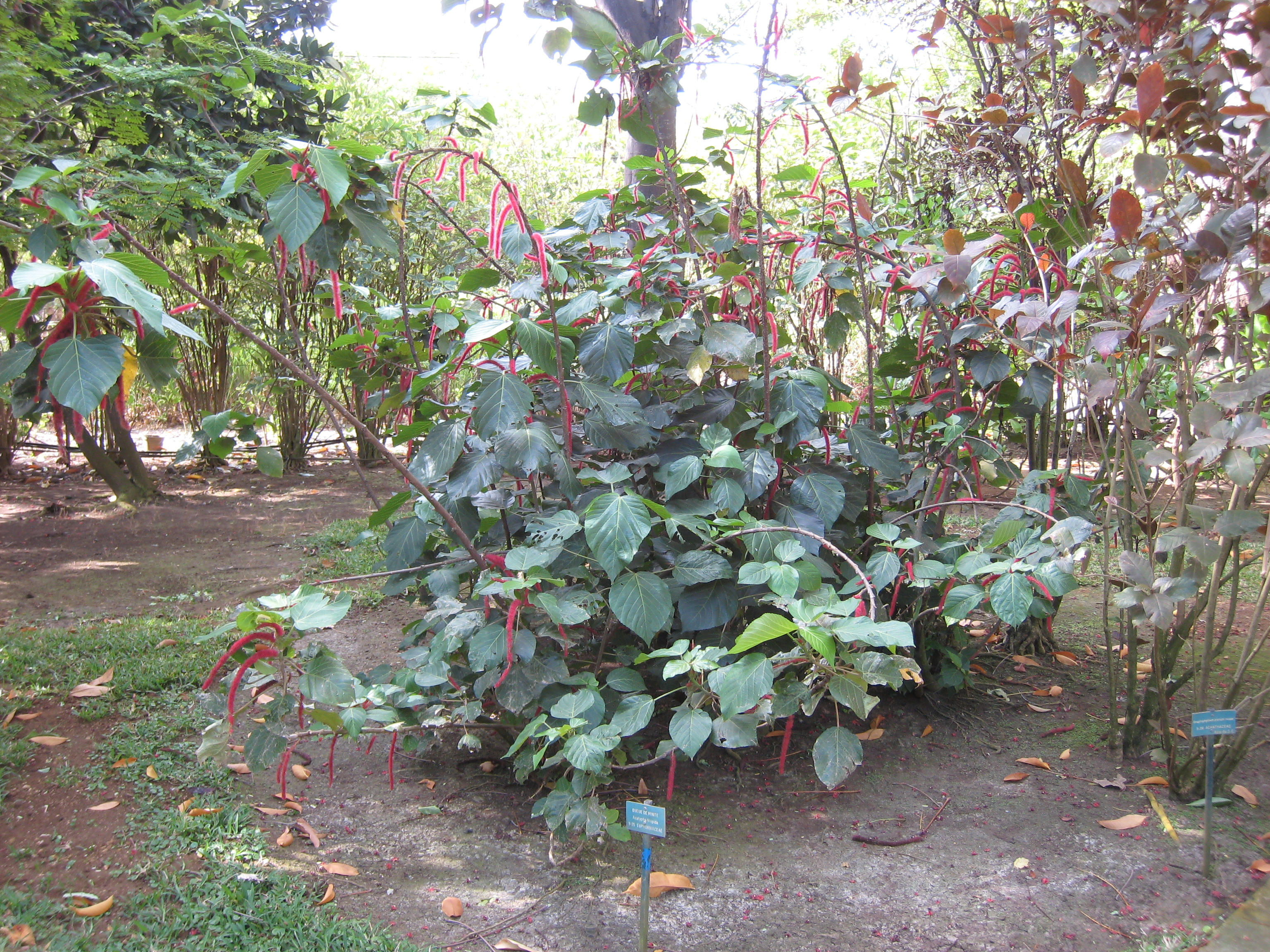 Acalypha hispida au Jardin d'Éden de Saint-Paul, sur l'île de La Réunion.